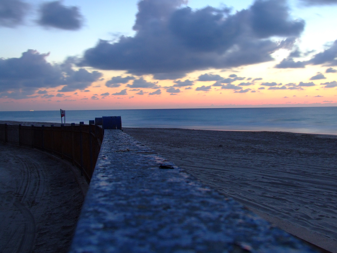 חוף אשדוד בערב. צולם על ידי אלכס מילקיס ב- 22 בספטמבר 2006.